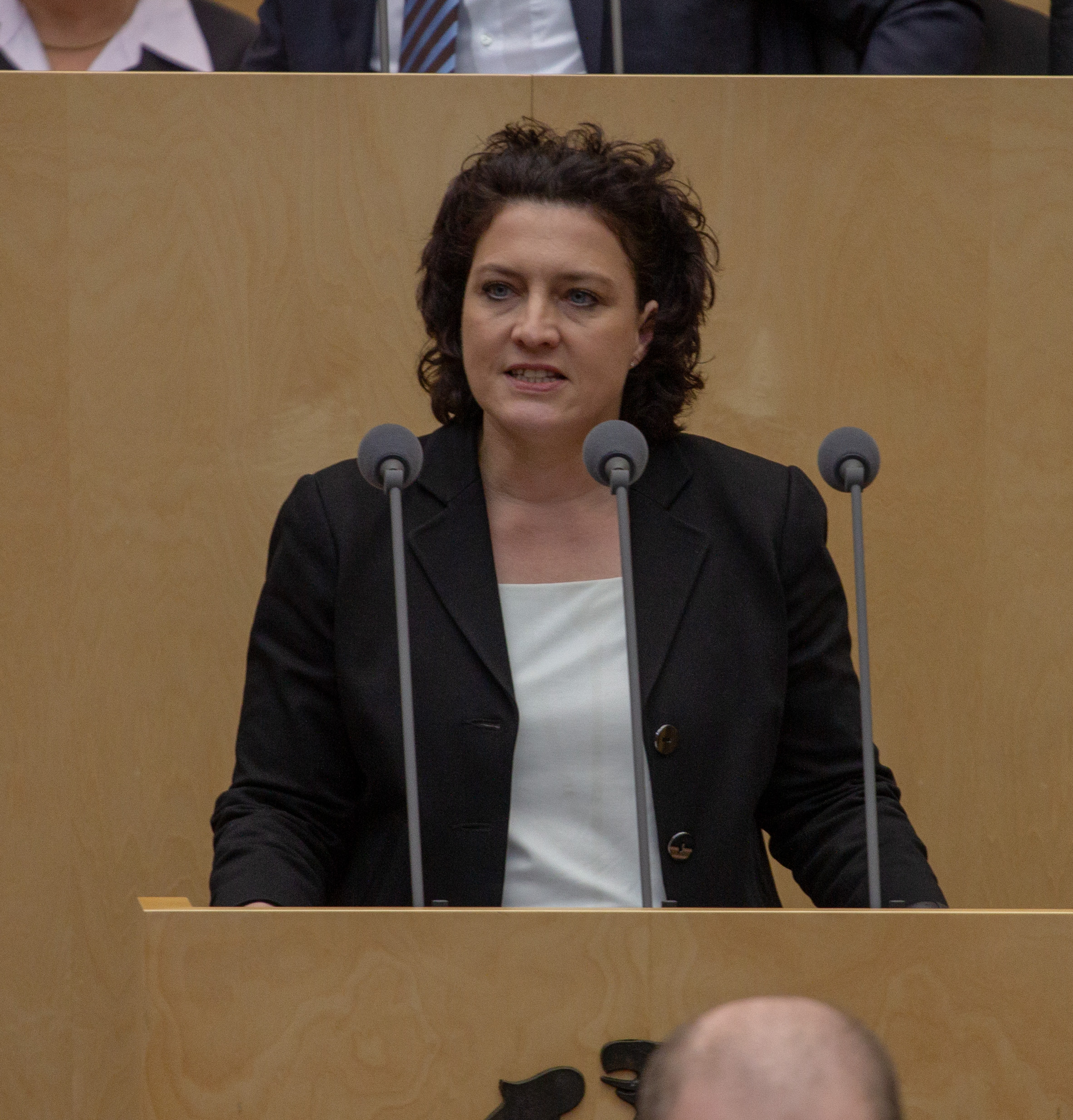 Plenarsitzung des Bundesrates am 12. April 2019 in Berlin.